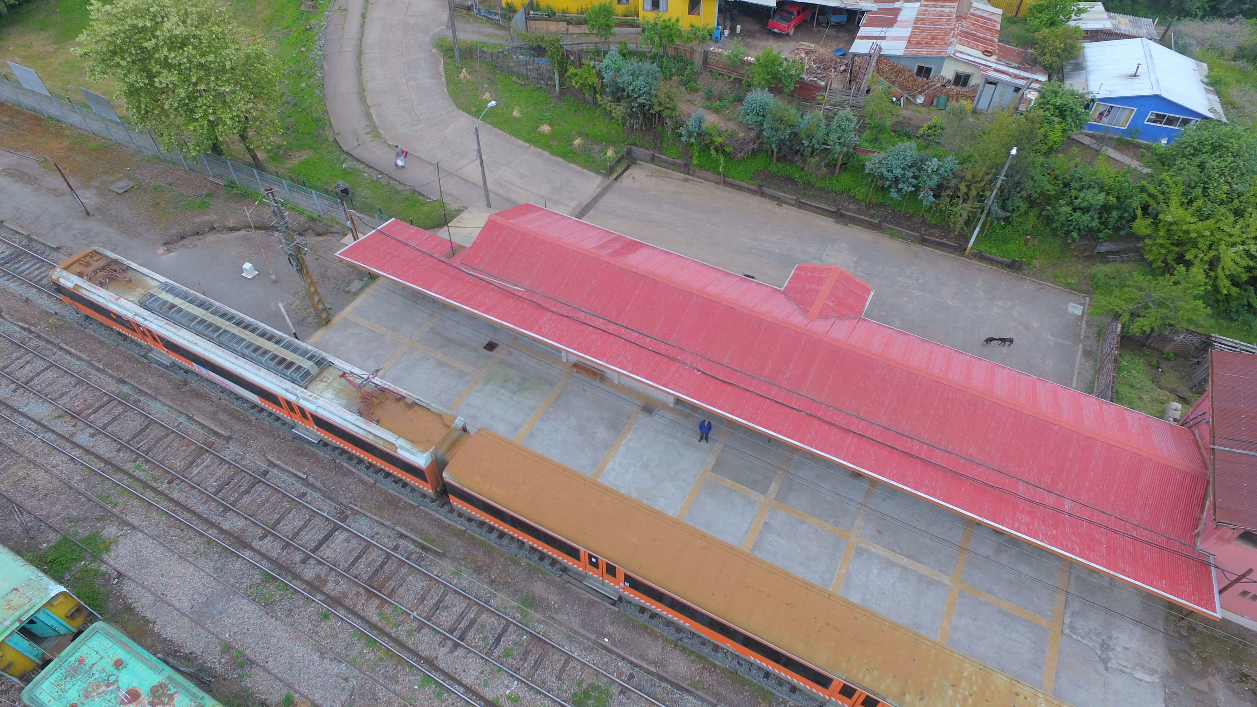 Estación de trenes de Talcamávida, servicio del Corto Laja